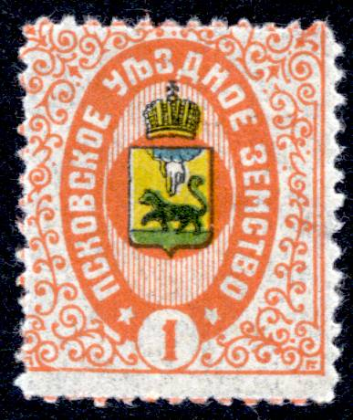 Земская марка. Псковский уезд № 43 (1907 г.)